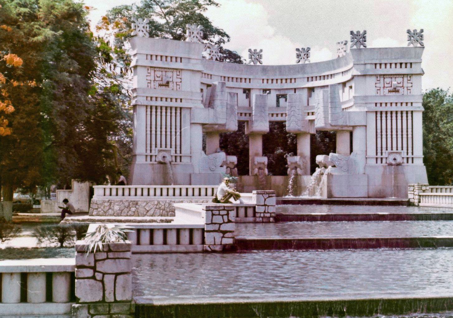 Mérida, Yucatán, 1975. Parque de las Americas.